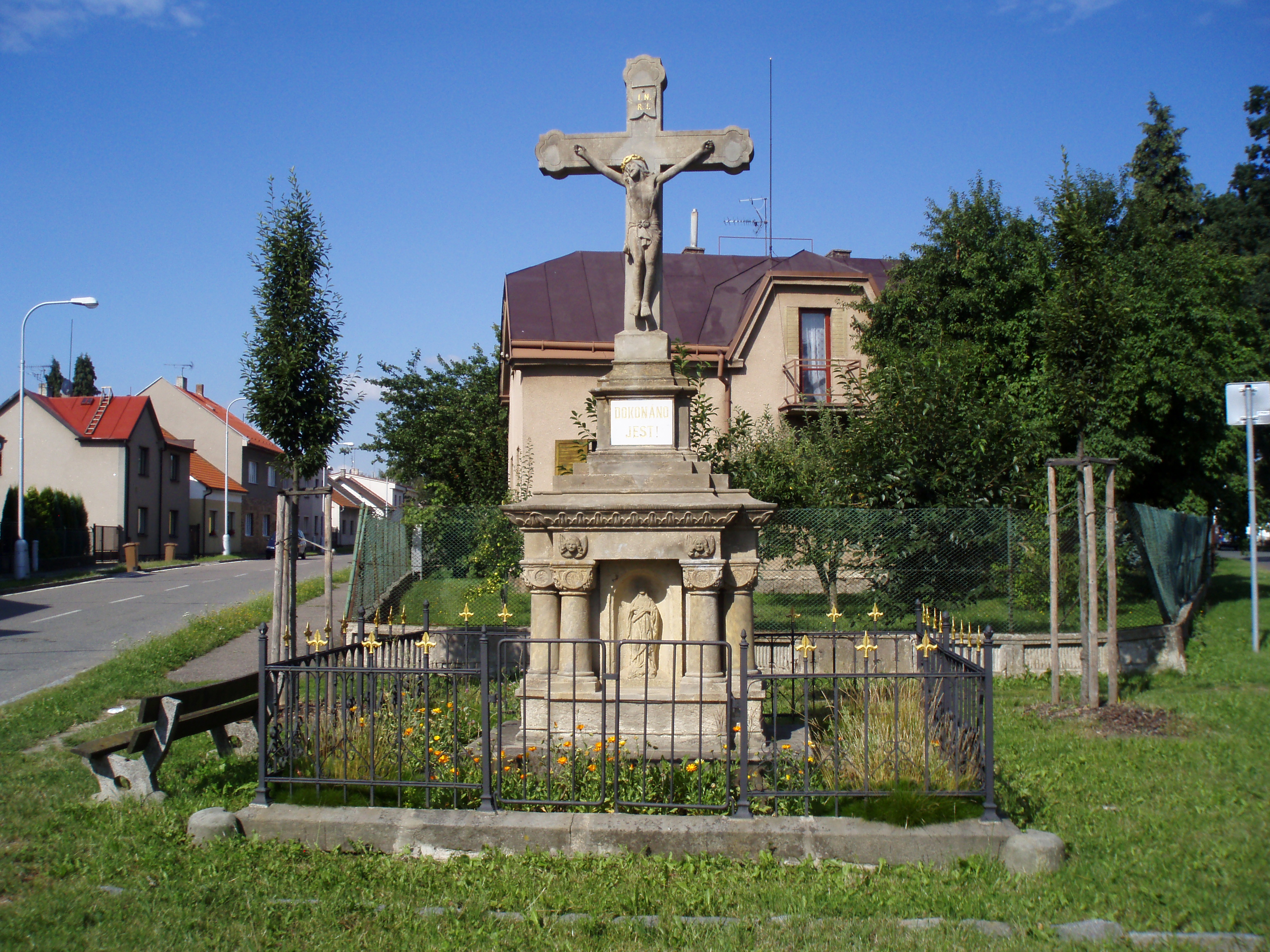 Kříž ve Svobodných Dvorech, rozcestí Cihlářské a Dvorské ulice.